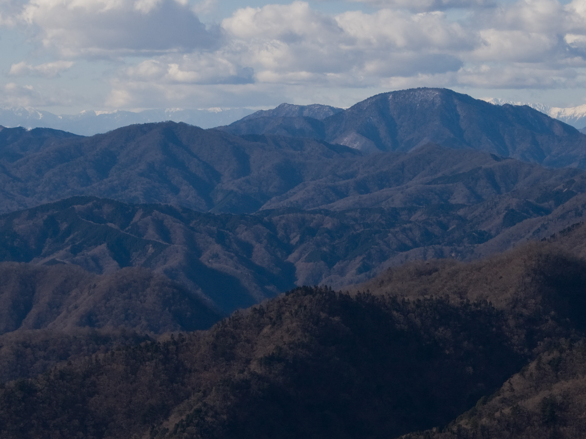 菰釣山(左) と御正体山(右)